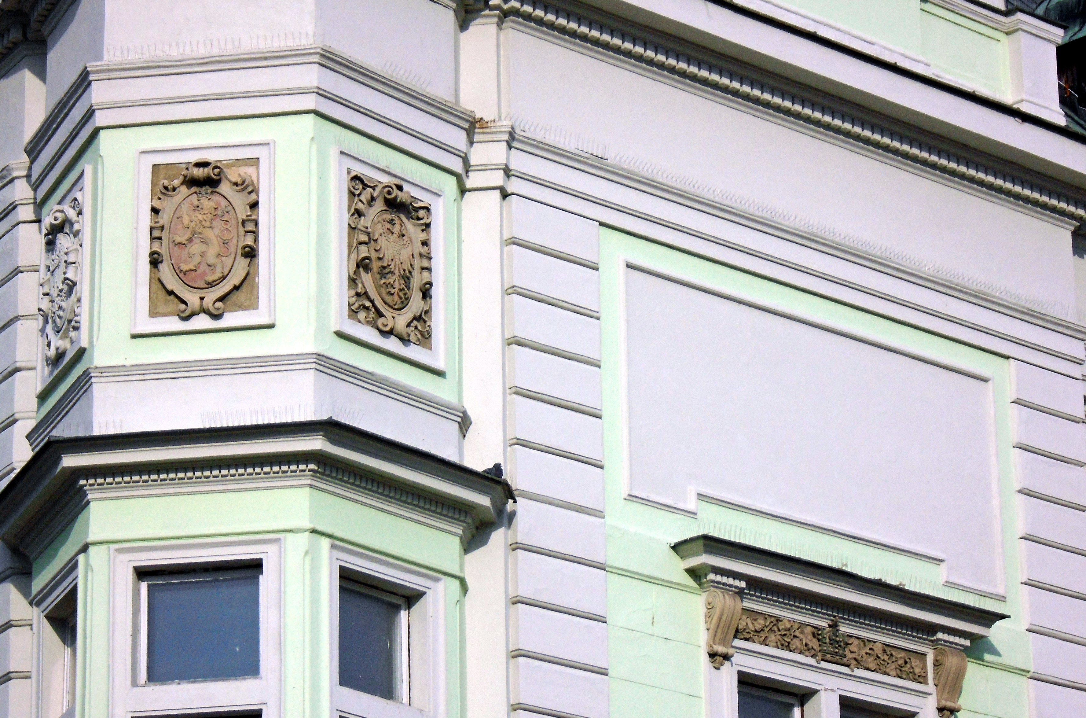 Detail fasády s městským znakem. V prázdném obdelníku původně byla Maroldova freska.